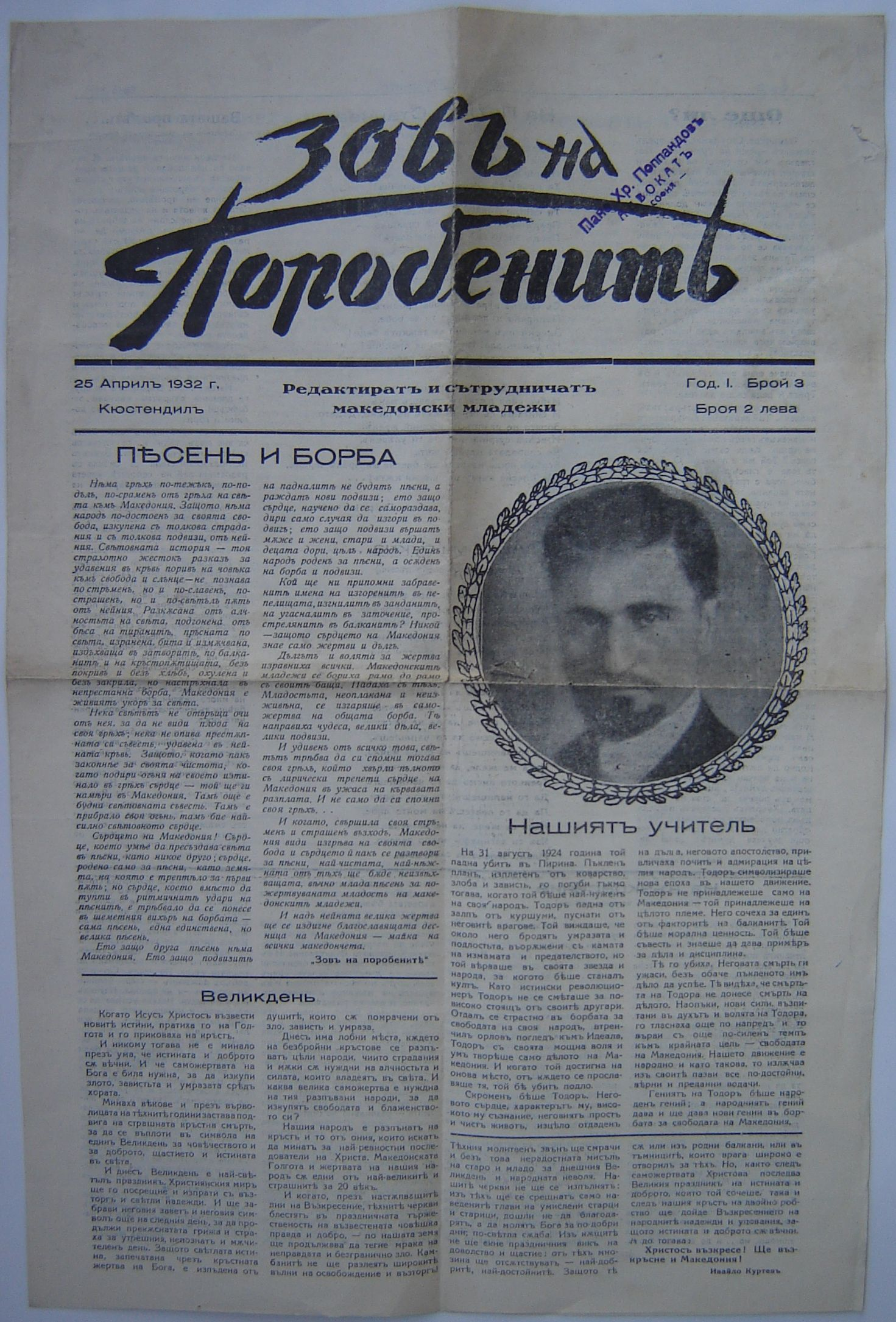 Главата на вестник "Зов на поробените", брой 3.